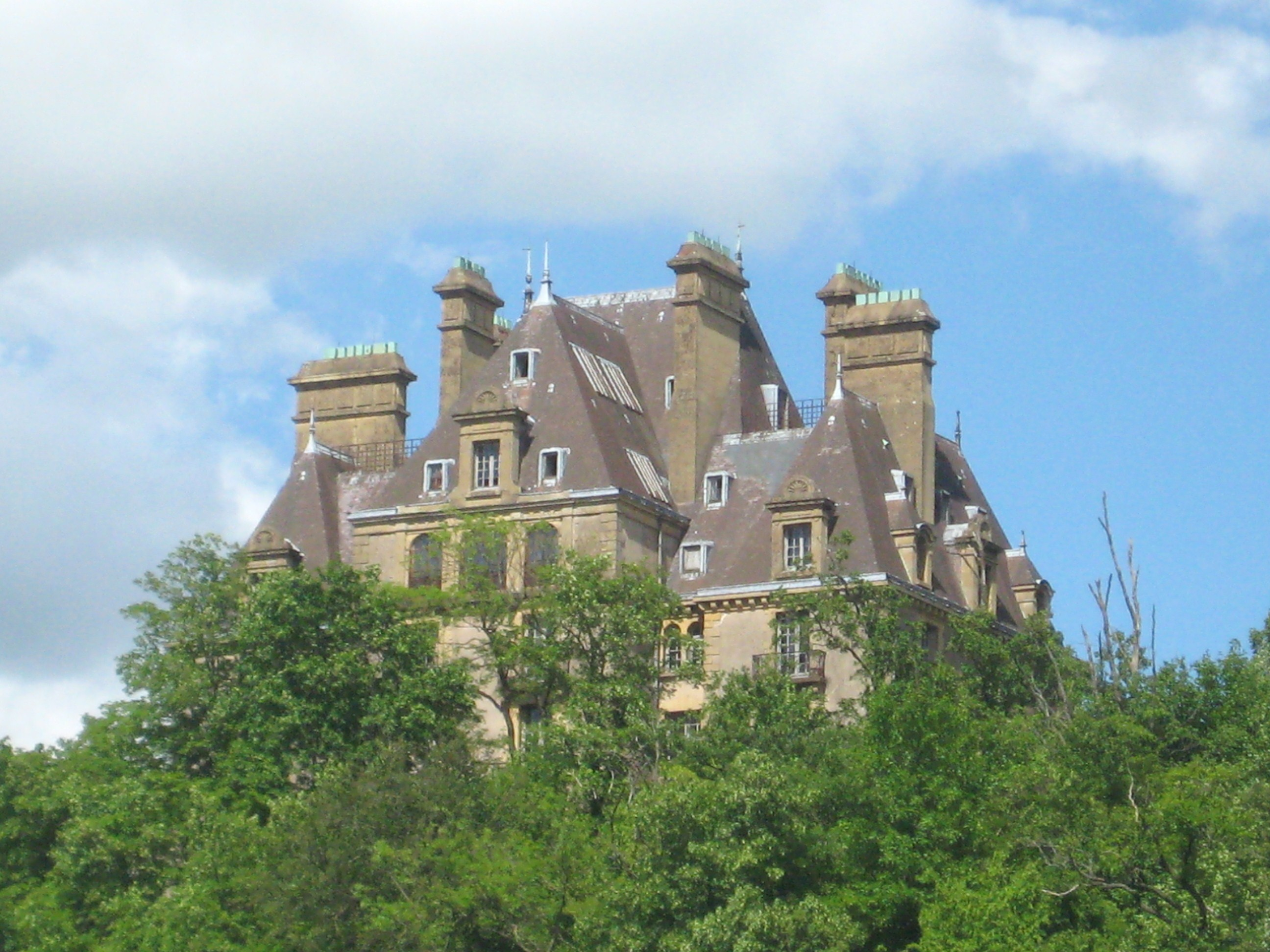 Description Château de Brouchetière, Jœuf, France (château construit après son mariage en 1905 pour Maurice de Wendel, dans le parc du château de son père, Henri de Wendel; construit par l'architecte Albert Jasson).Date 18 May 2009Source mon appareil photoAuthor Aimelaime Château de Brouchetière, Jœuf, France (château construit après son mariage en 1905 pour Maurice de Wendel, dans le parc du château de son père, Henri de Wendel; construit par l'architecte Albert Jasson).